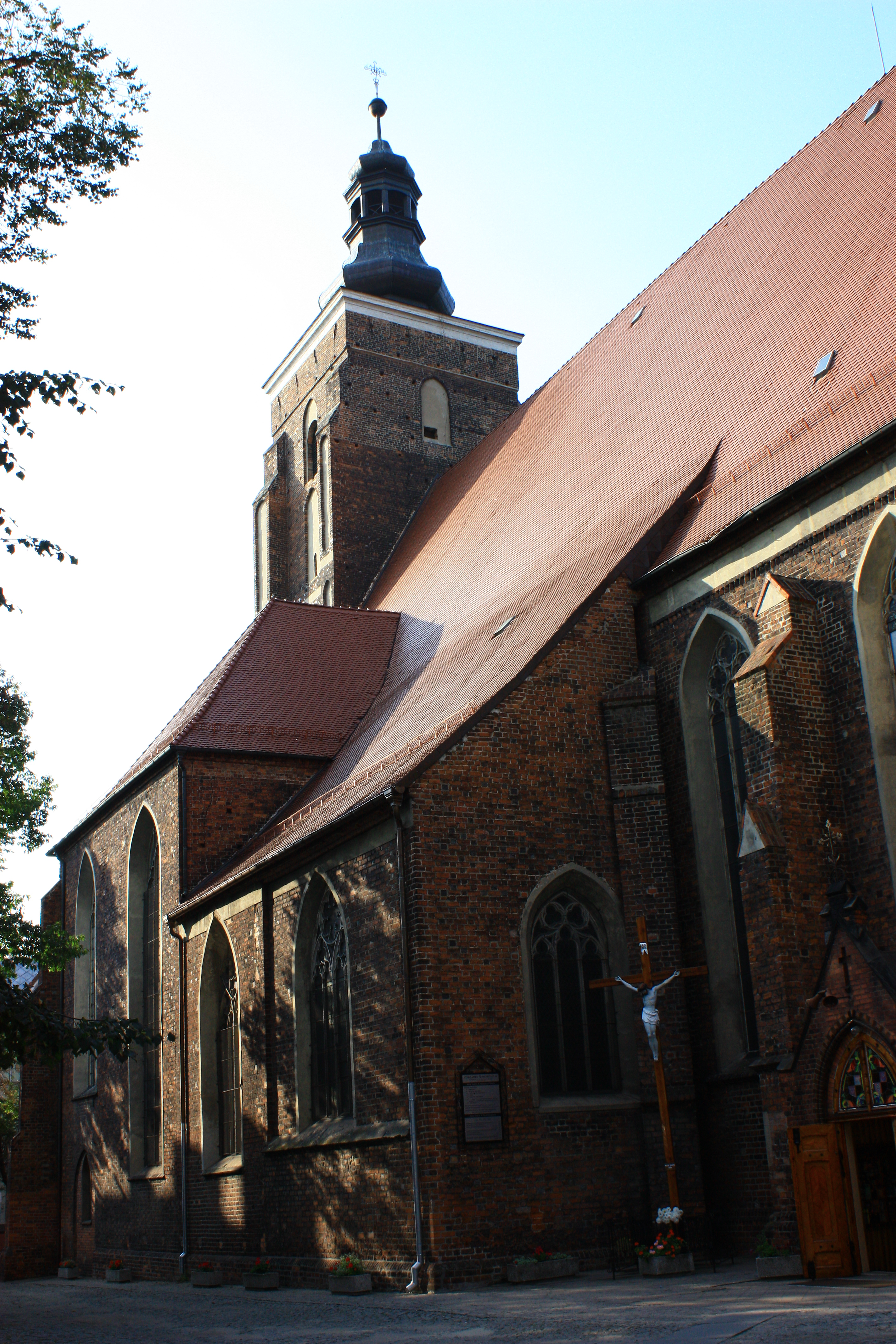 Namysłów, kościół par. p.w. śś. Piotra i Pawła, XV-XVI